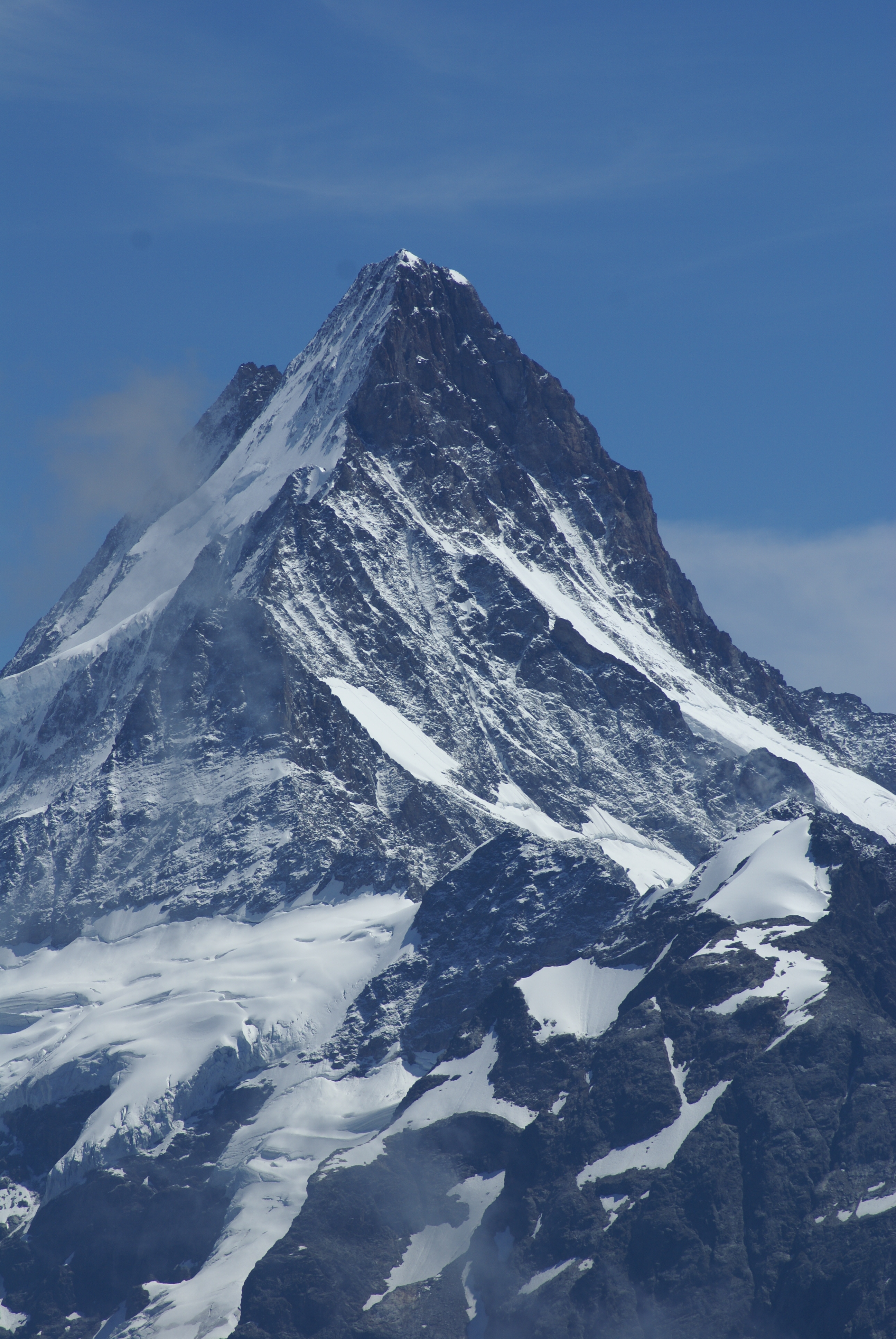 Schreckhorn, Berner Alpen